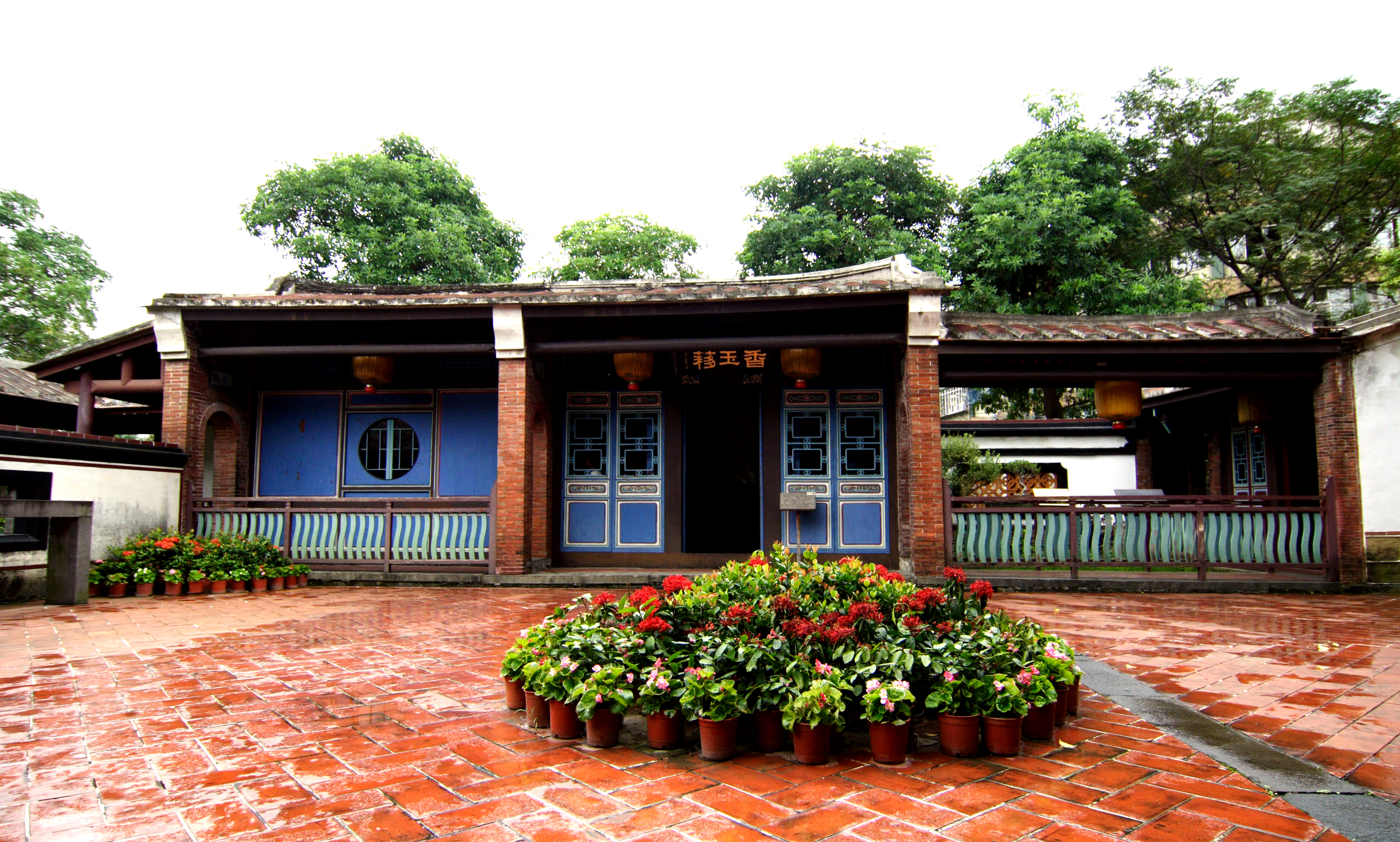 臺灣臺北縣板橋市的林本源園邸中的庭園建築香玉簃